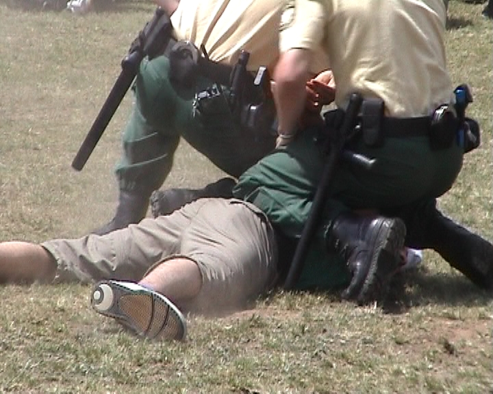 Vorführung einer Festnahme durch die Bereitschaftspolizei Würzburg.